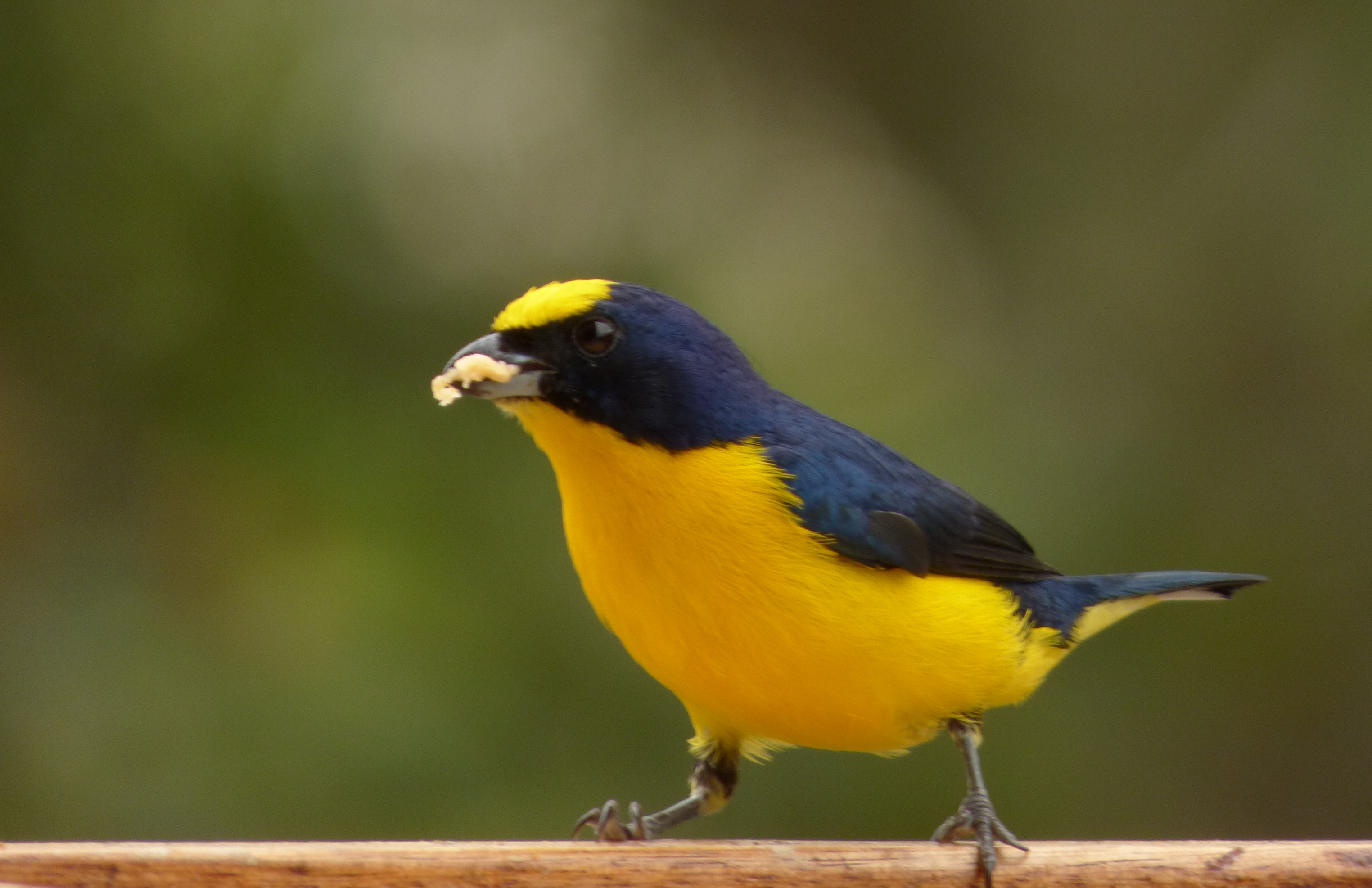 Eufonia gorgiamarilla (Euphonia laniirostris)